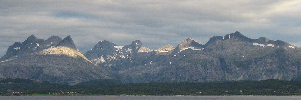 Bilde av Børvasstindene ved Bodø. Tatt fra Fenes utenfor Bodø.